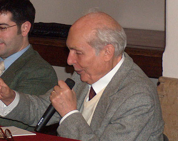 Immagine del prof. Claudio Beretta ad una presentazione al Circolo Filologico Milanese - Licenza: GFDL